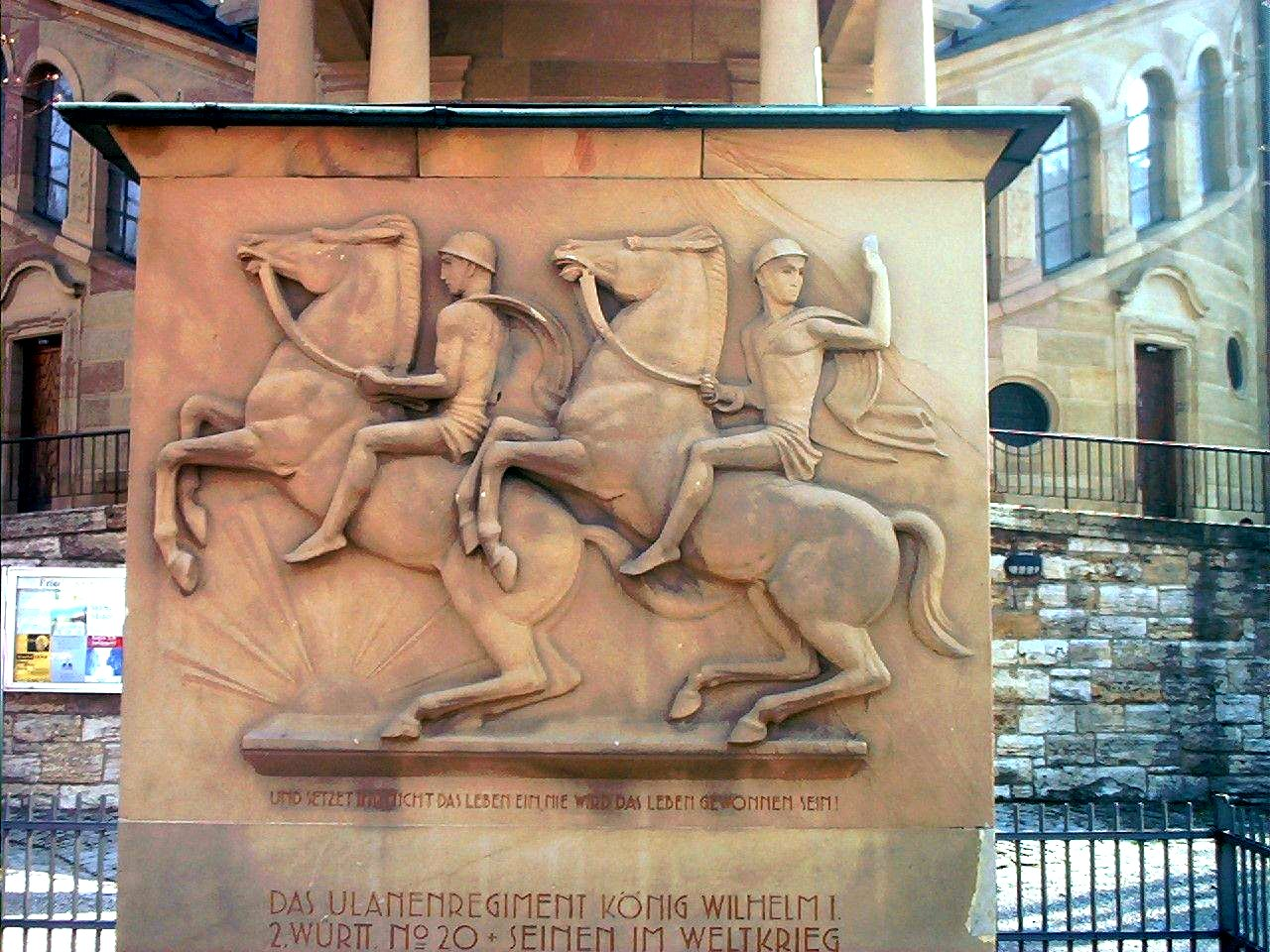 Denkmal für das Ulanen-Regiment König Wilhelm I. (2.Württ.) Nr. 20 in D-761xx Ludwigsburg hinter der Garnisons-Kirche